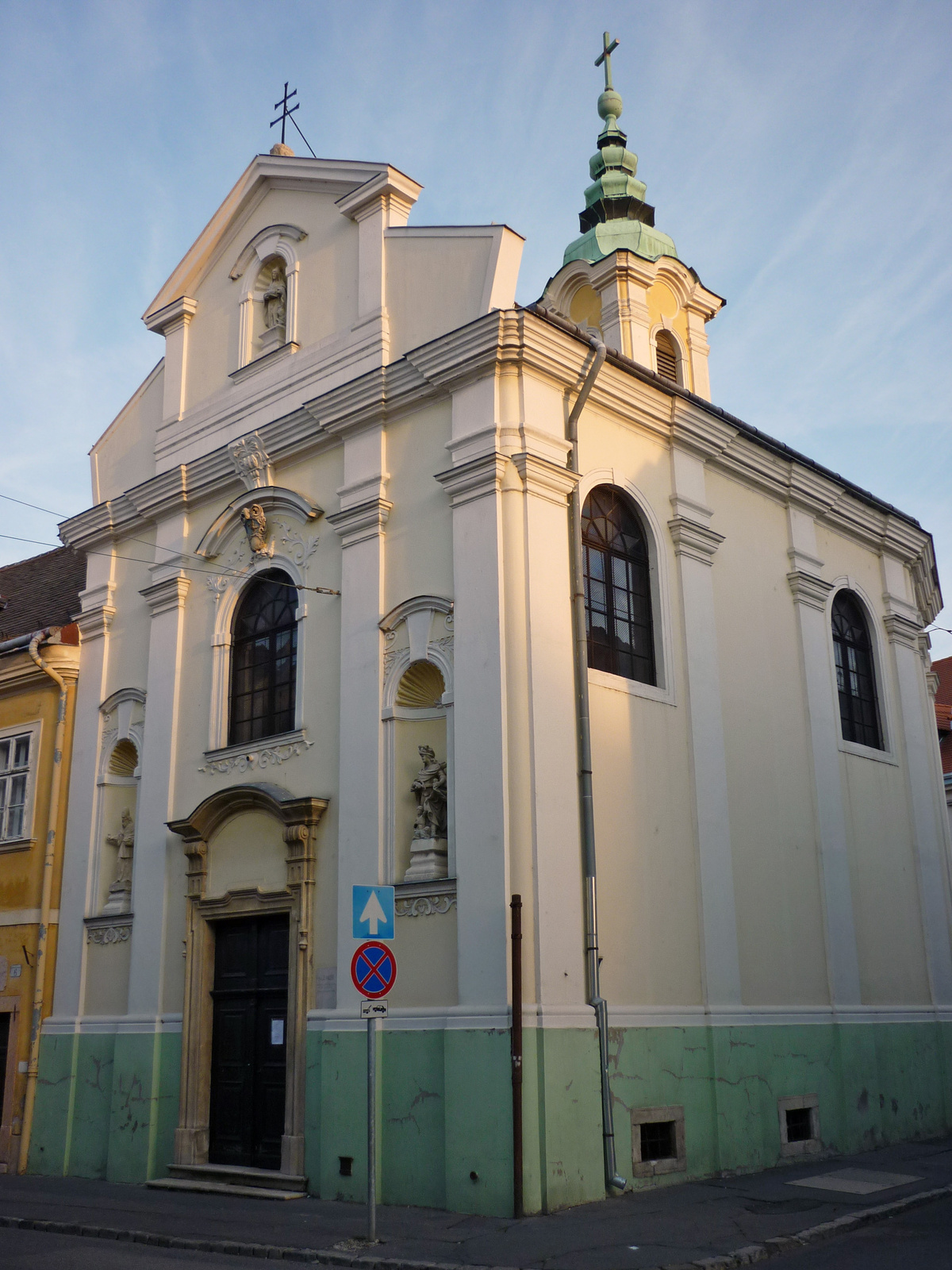 Magyar ispita temploma (Győr, Rákóczi Ferenc út 6.) This is a photo of a monument in Hungary, Identifier: 4343